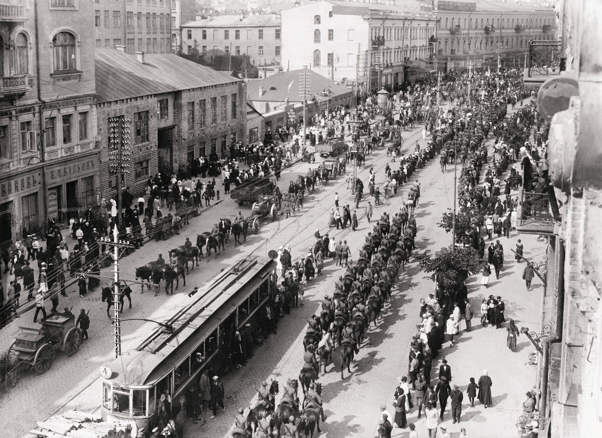 Polscy żołnierze wkraczają do Kijowa.